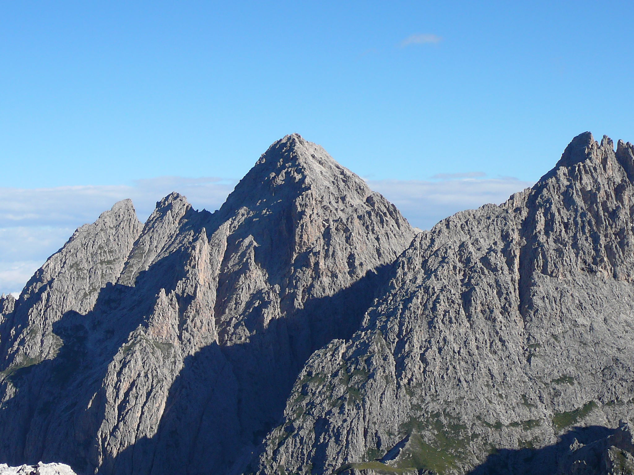 Il Sass Rigais a sinistra e il Furchetta a destra